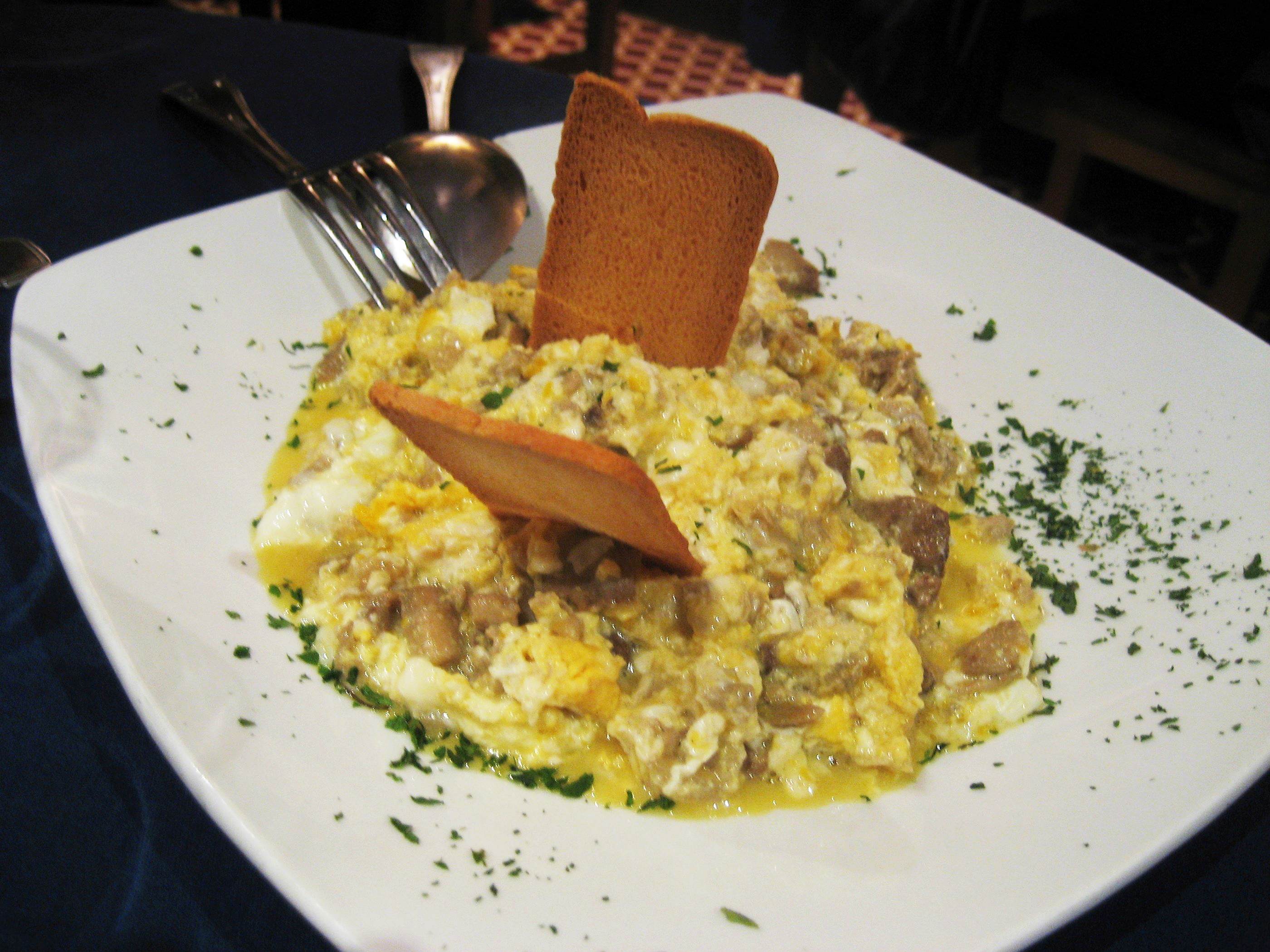 Revuelto de perretxikos